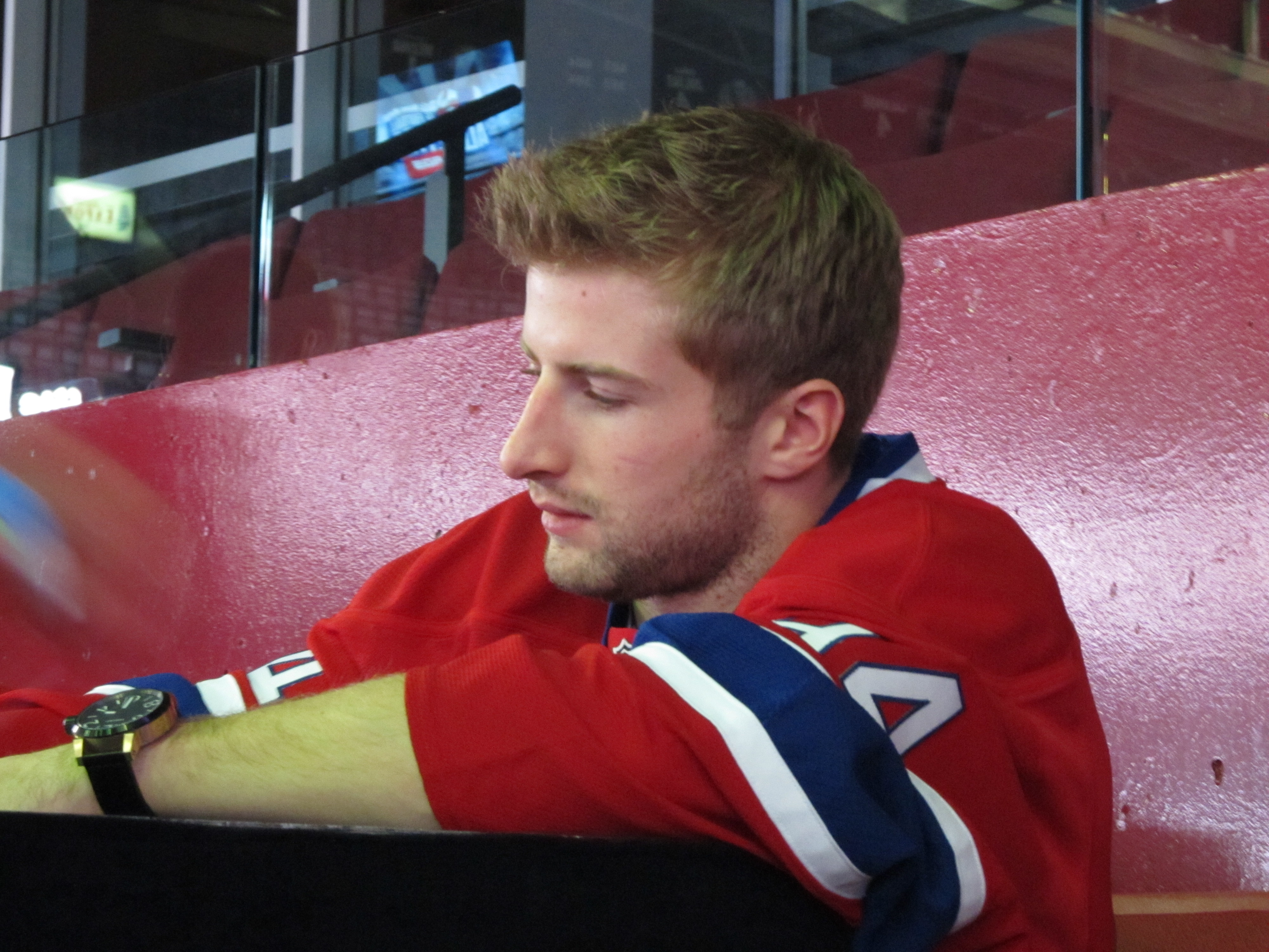 Tom Pyatt, lors d'une édition du festi-fan, celle de 2010